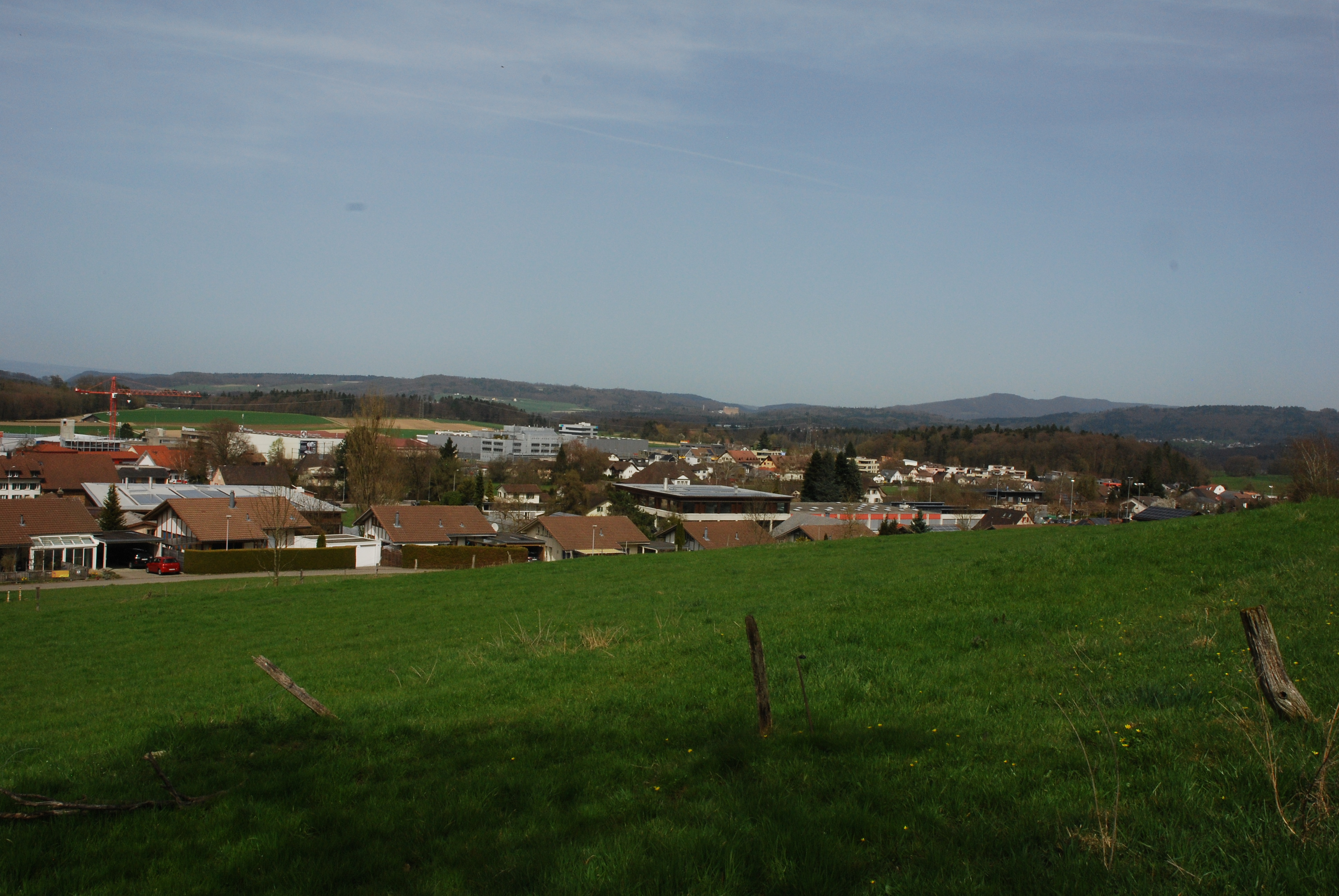 Blick auf Mägenwil vom Steindler Richtung Nordosten